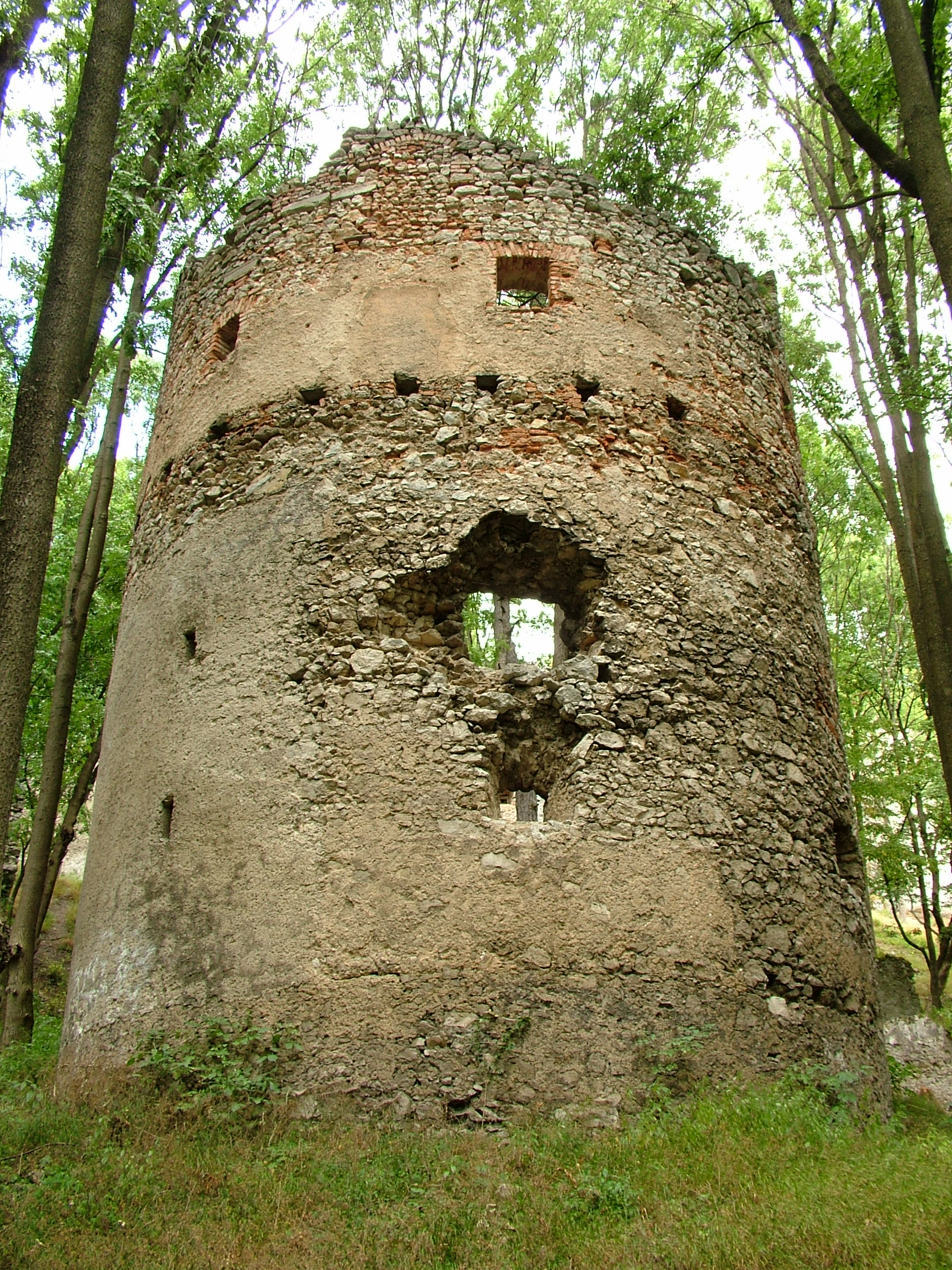 Hrad Dobrá Voda